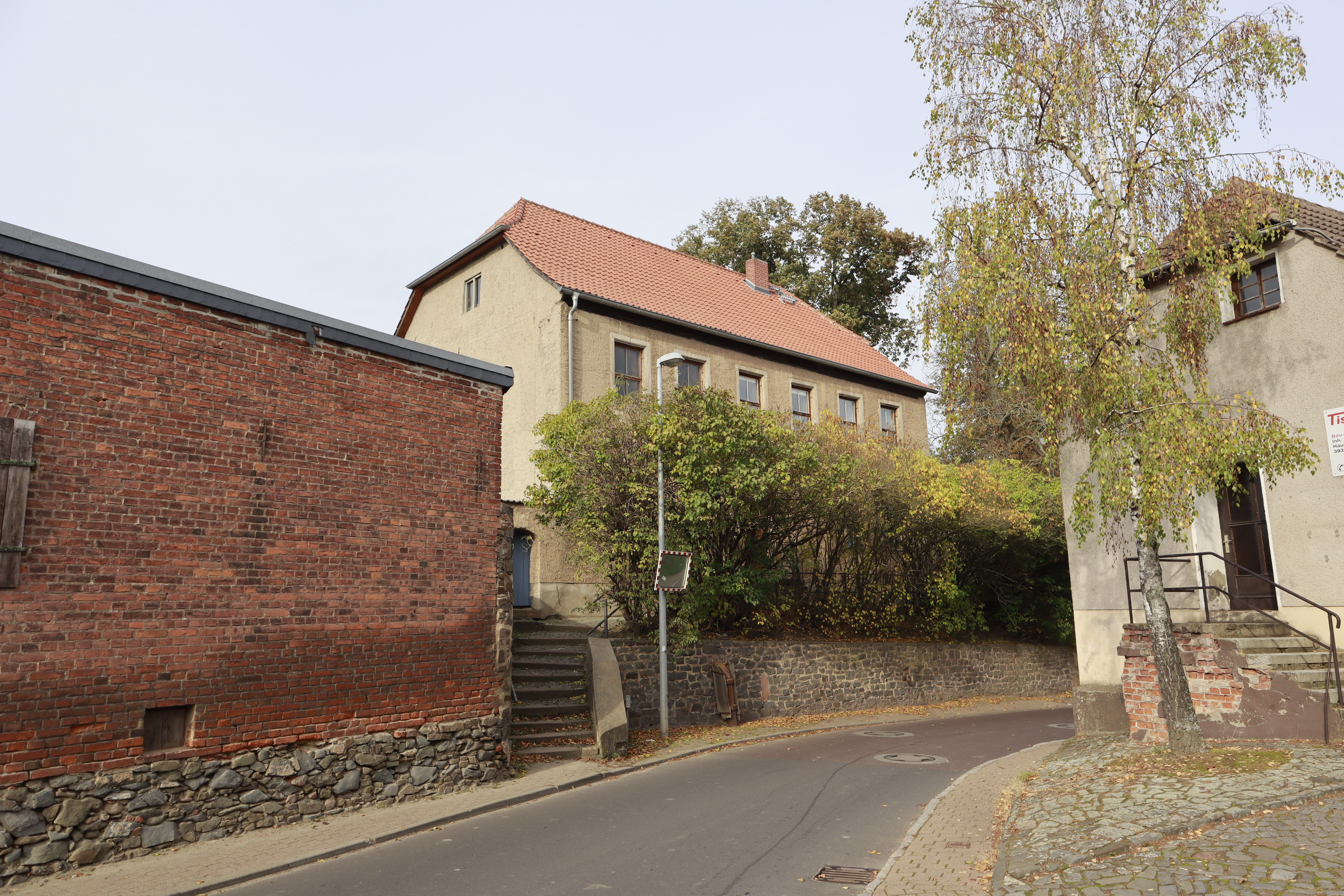 Hundisburg, Hospital